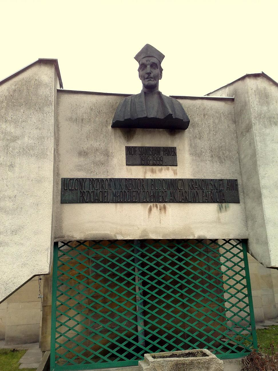 Pomnik rektora na Akademii Wychowania Fizycznego w Krakowie